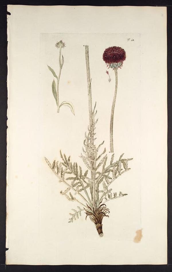 Florae Austriacae, sive, Plantarum selectarum in Austriae archiducatu :sponte crescentium icones, ad vivum coloratae, et descriptionibus, ac synonymis illustratae /opera et sumptibus Nicolai Josephi Jacquin.